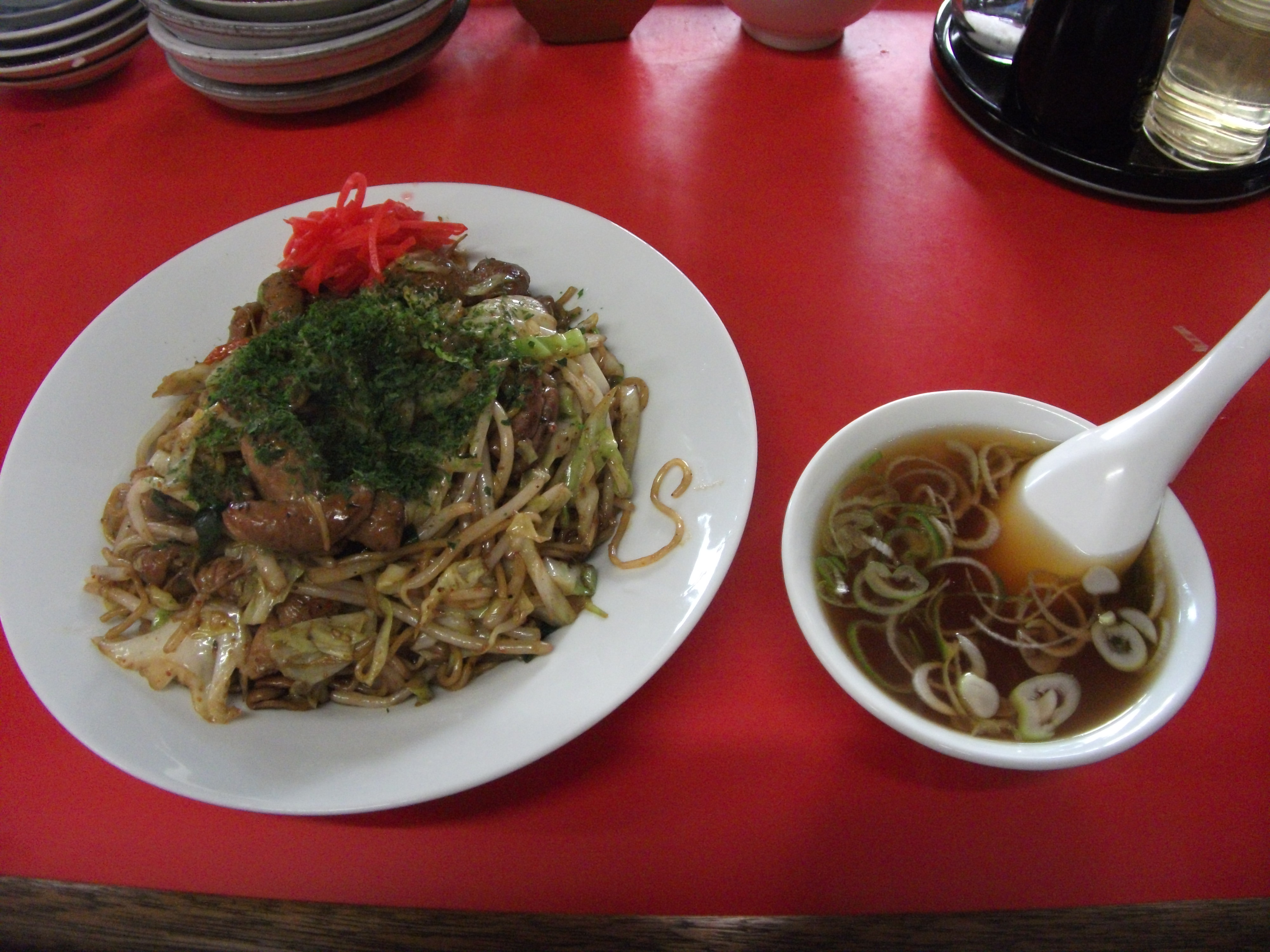 埼玉県嵐山町、嵐山辛モツ焼きそば